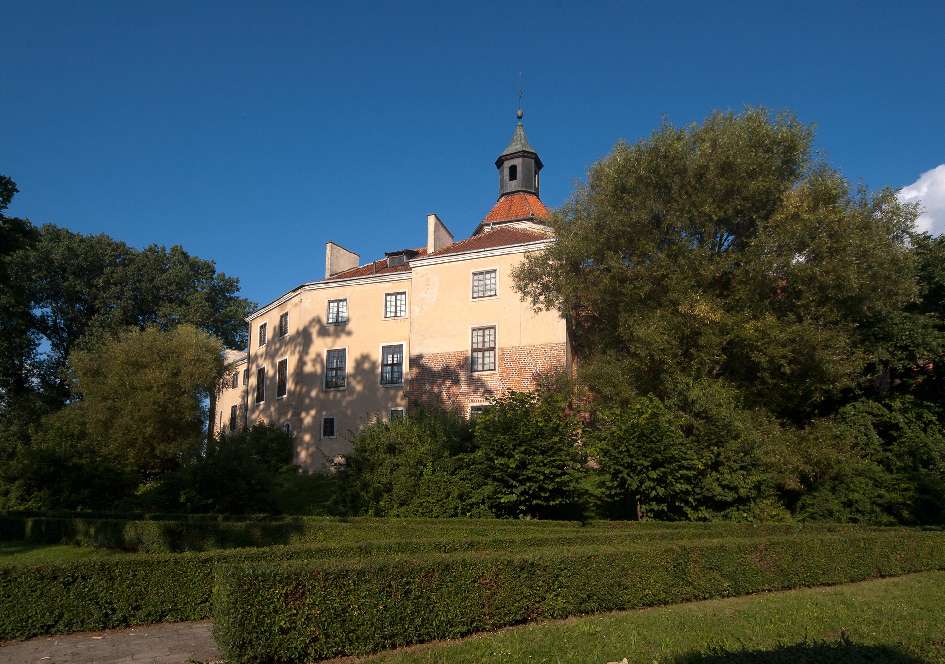 mury spalonego "małego zamku" /zamek Dohnów/ Morąg, ul. Dąbrowskiego 54, Morąg (miasto)